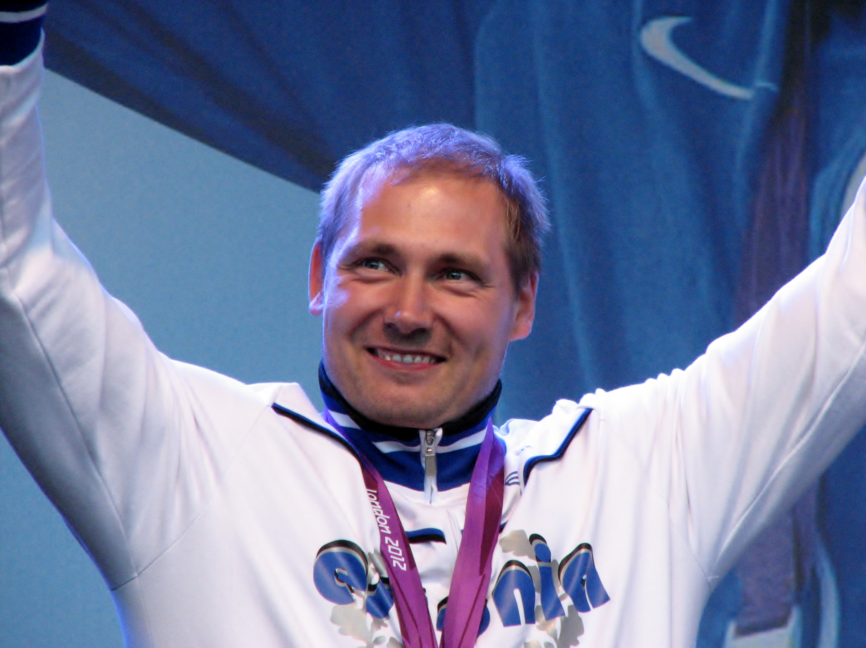 Pronksmedali võitnud Gerd Kanter Vabaduse väljakul Londoni olümpiamedalistide tervituspeol